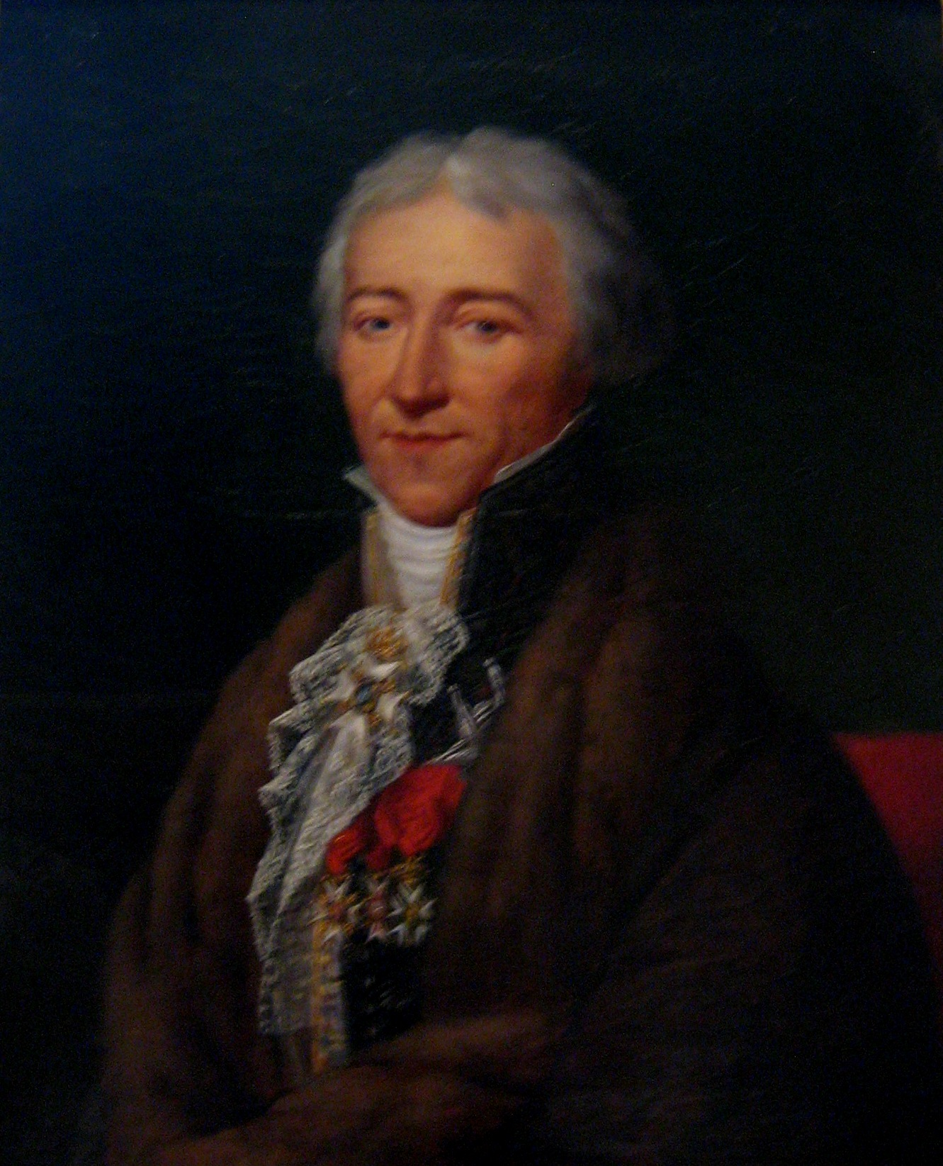 Portrait de Jean-François de Bourgoing portant l'Ordre de l'étoile polaire